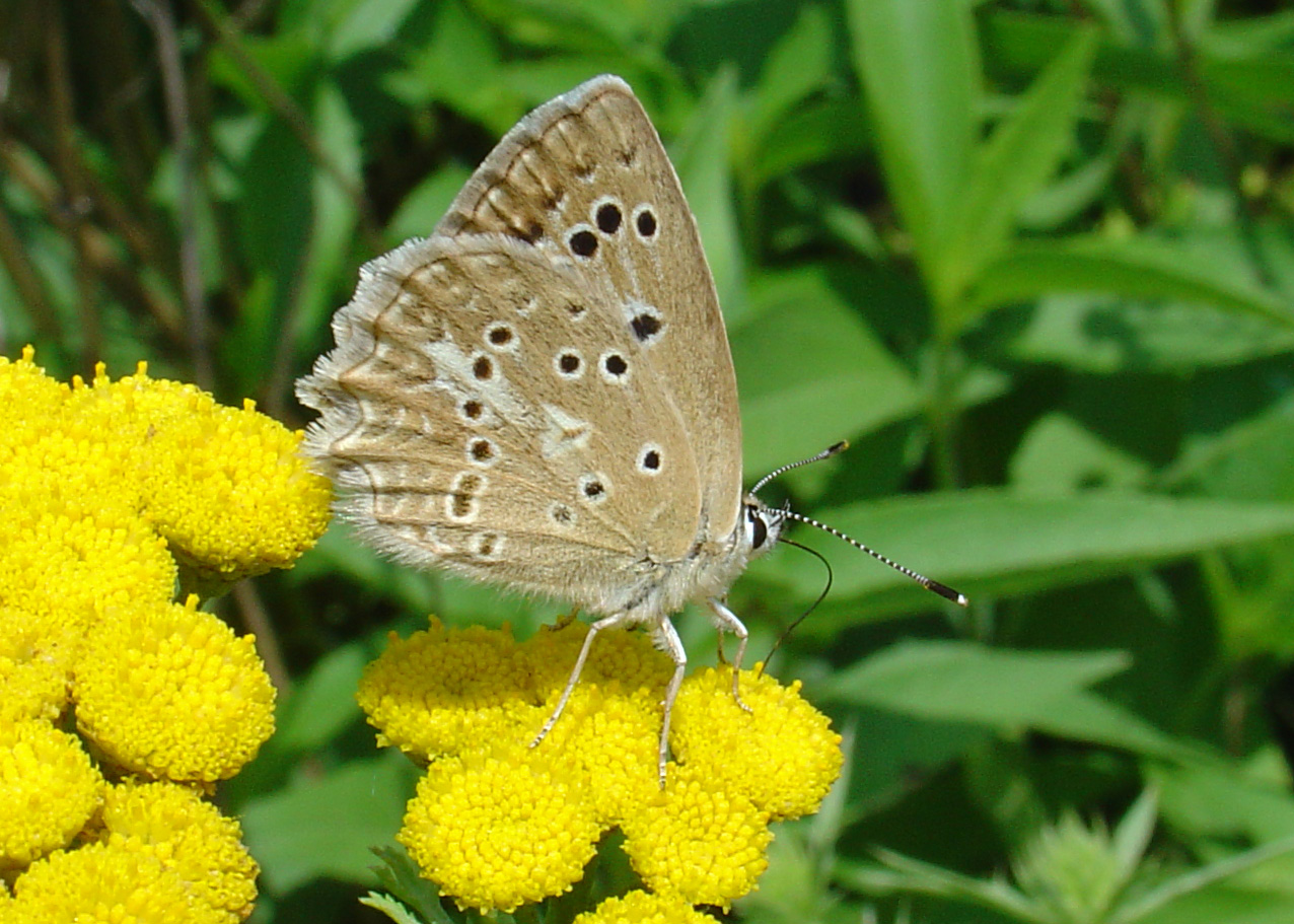 Polyommatus daphnis